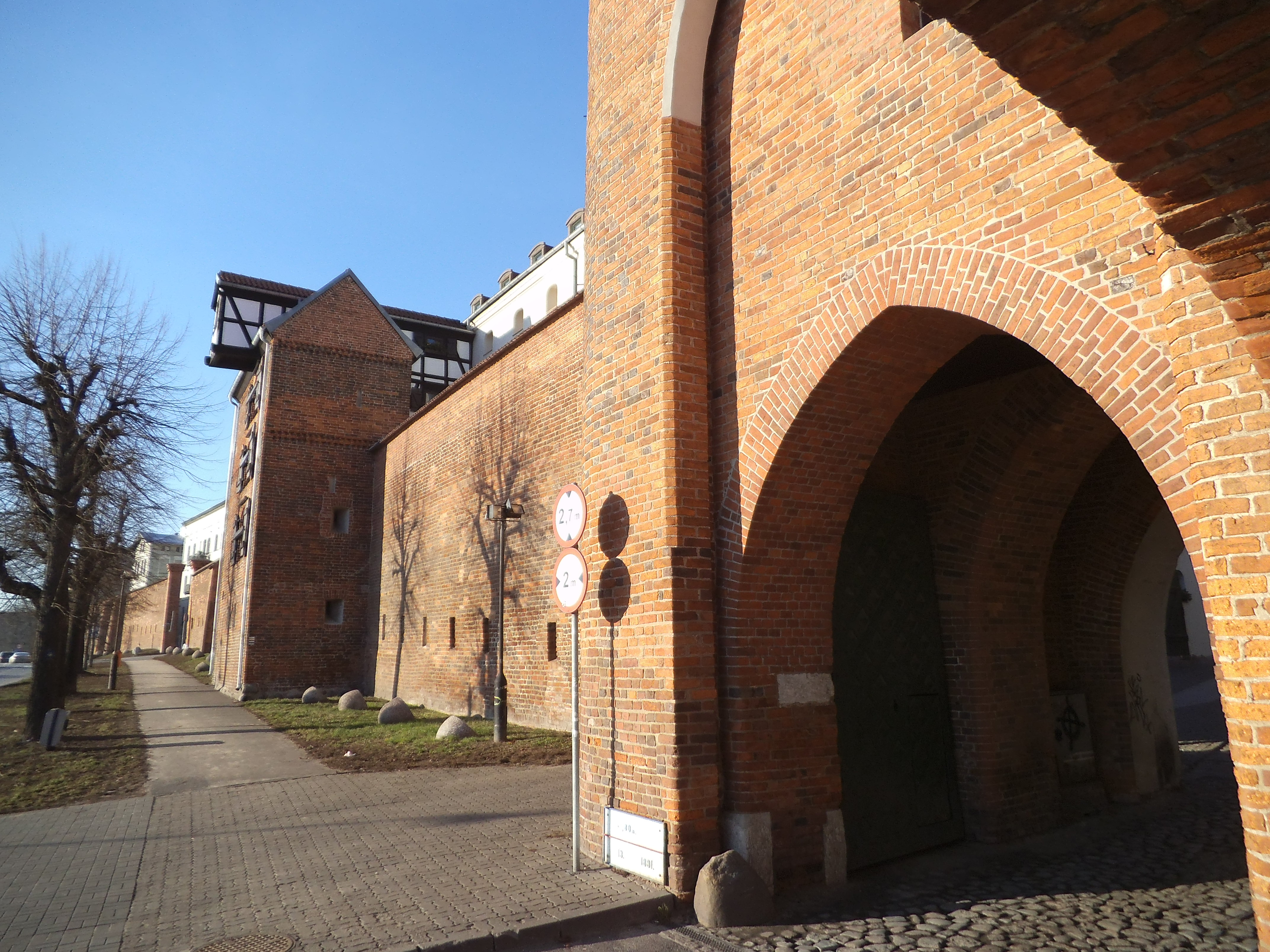 Mury obronne Starego Miasta